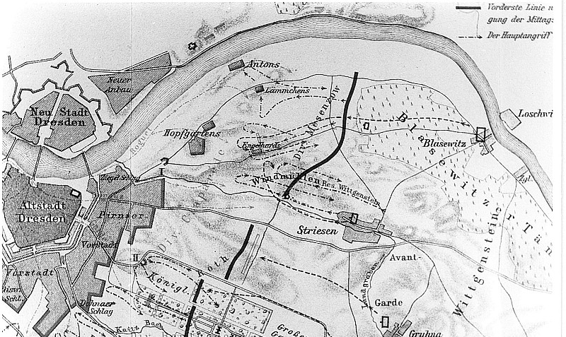 Original image description from the Deutsche Fotothek Dresden-Striesen. Plan zur Schlacht bei Dresden, aus: Friedrich: Die Befreiungskriege, 1911